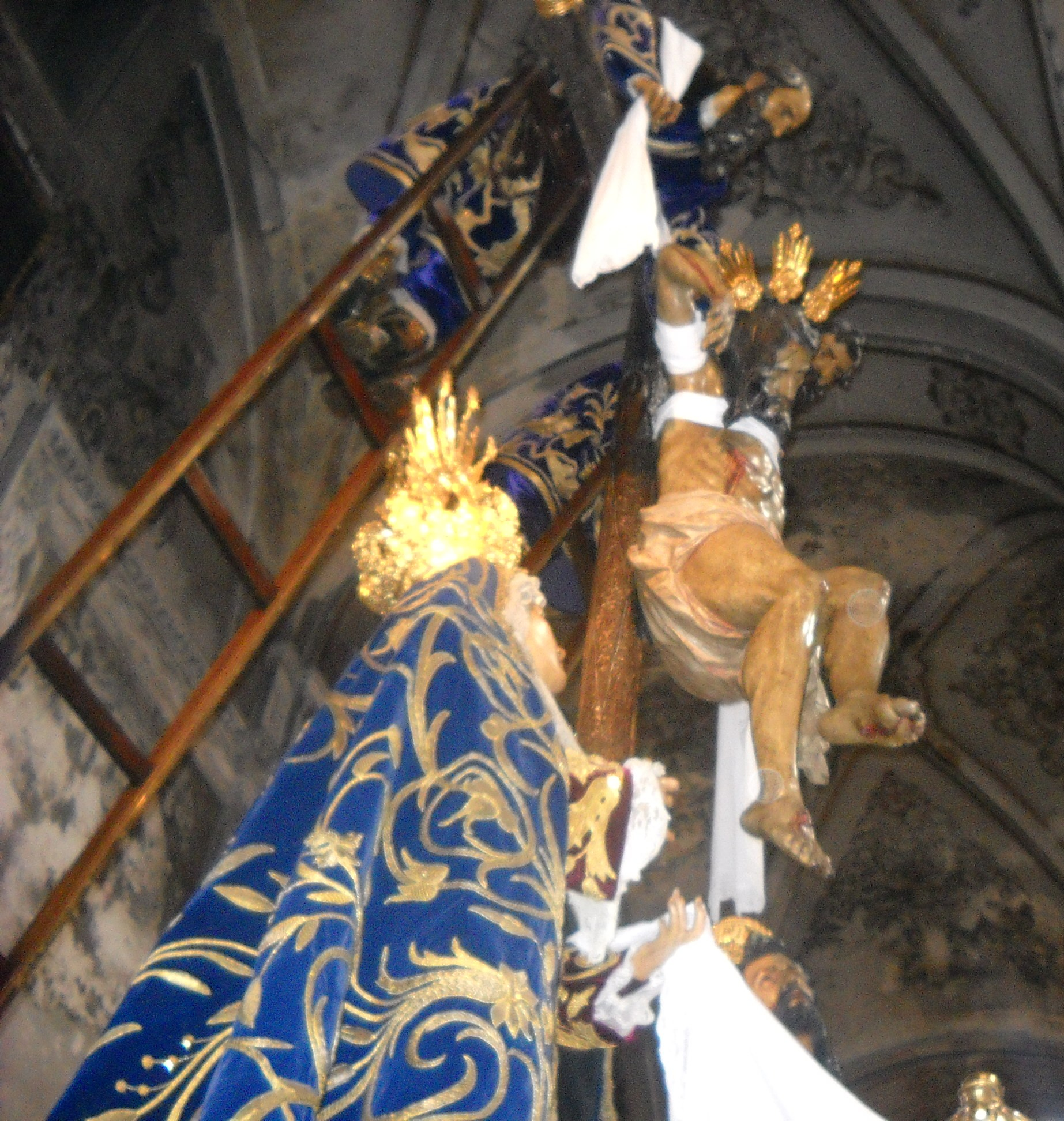 Paso del Descendimiento de Cristo